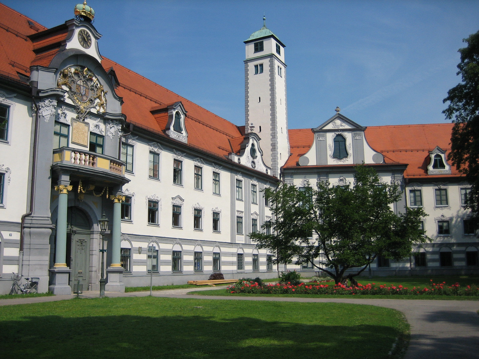 Alte fürstbischöfliche Residenz in Augsburg am Fronhof